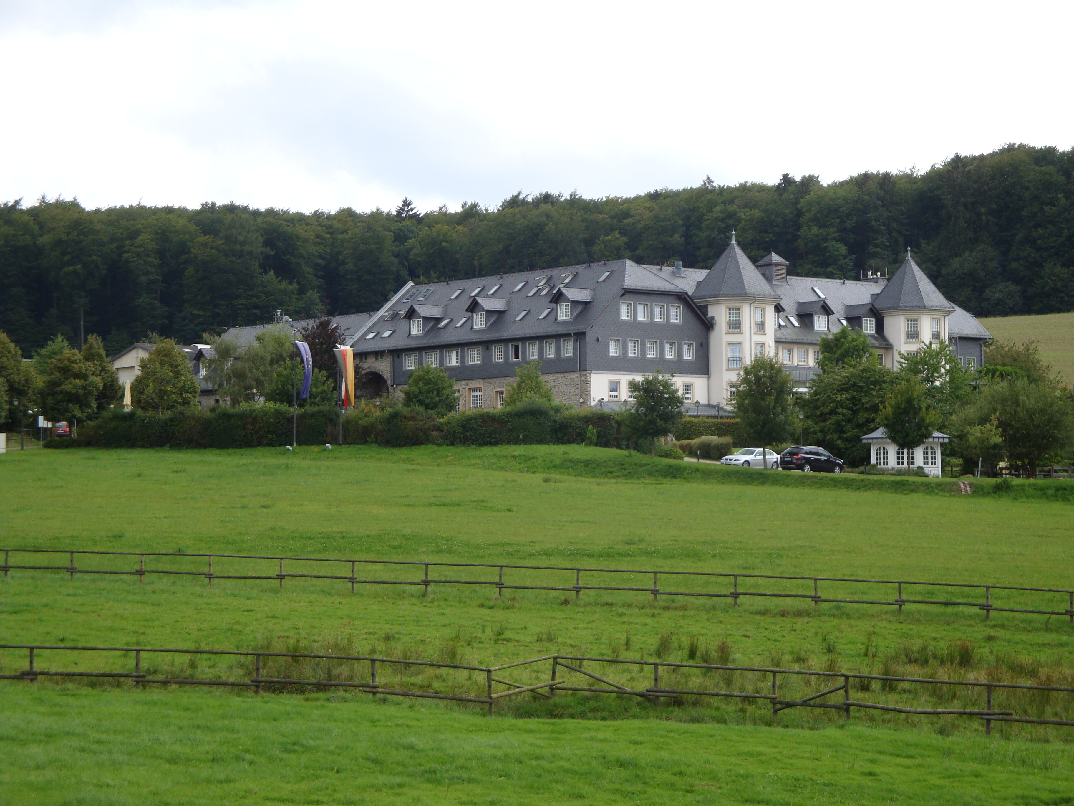 Das Hofgut Georgenthal im Rheingau-Taunus-Kreis